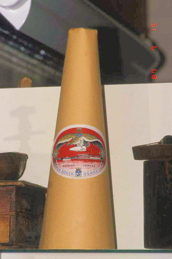 Old Finnish sugar packaging ("sokeritoppa")